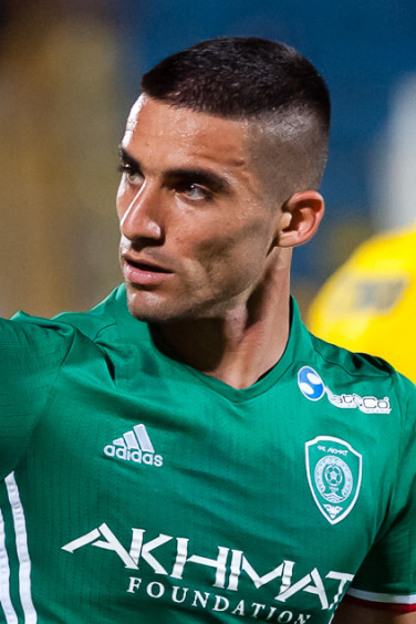 «Ростов» - «Ахмат»